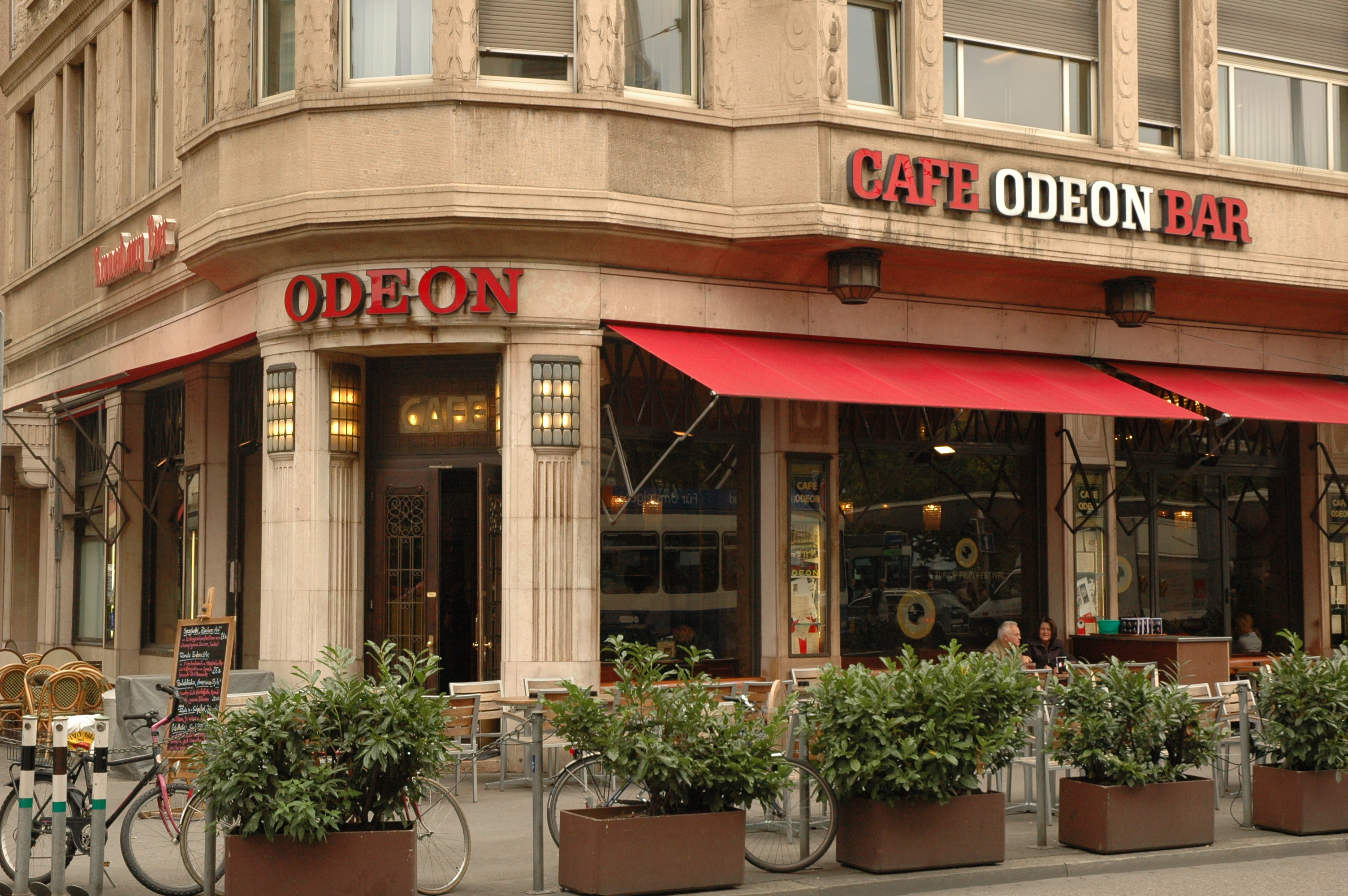 Café Odeon in Zürich